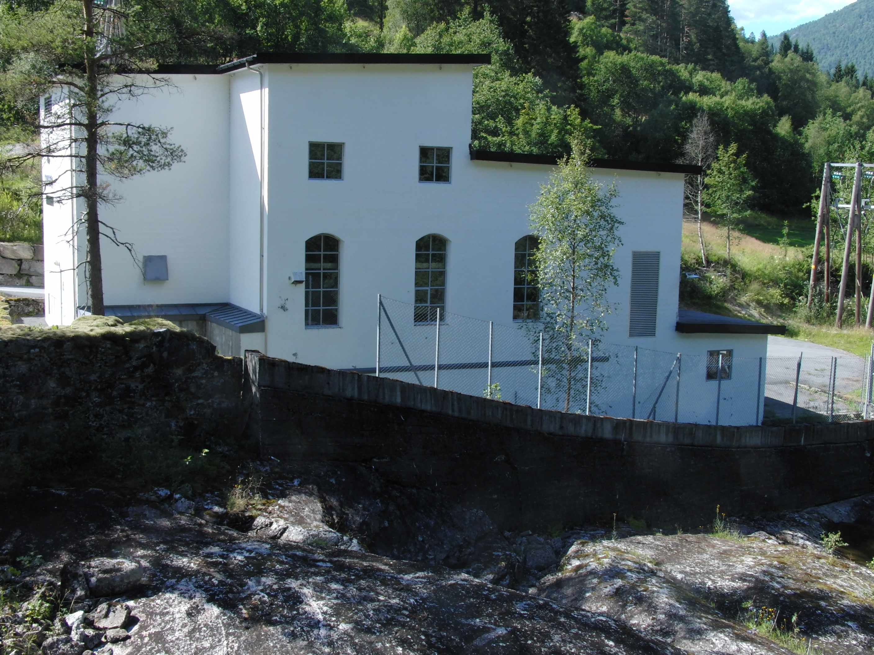 Kolfossen kraftverk